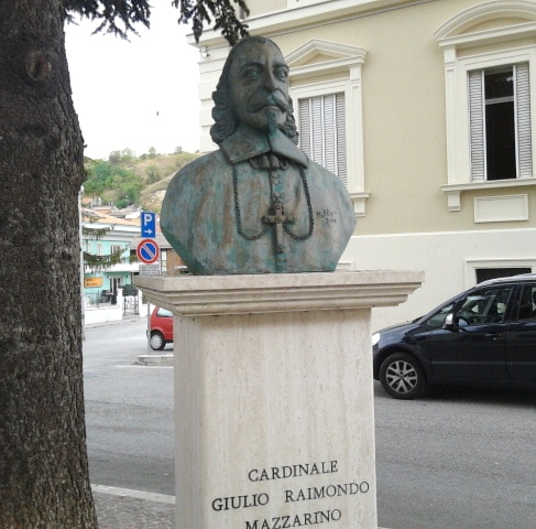 Busto bronzeo del cardinale Giulio Mazzarino